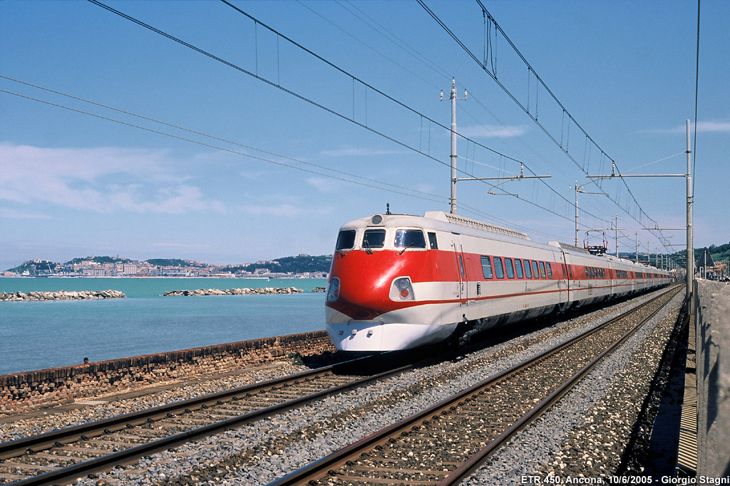 Elettrotreno ETR.450 in corsa sulla linea adriatica, fra le stazioni di Palombina e Ancona Torrette.